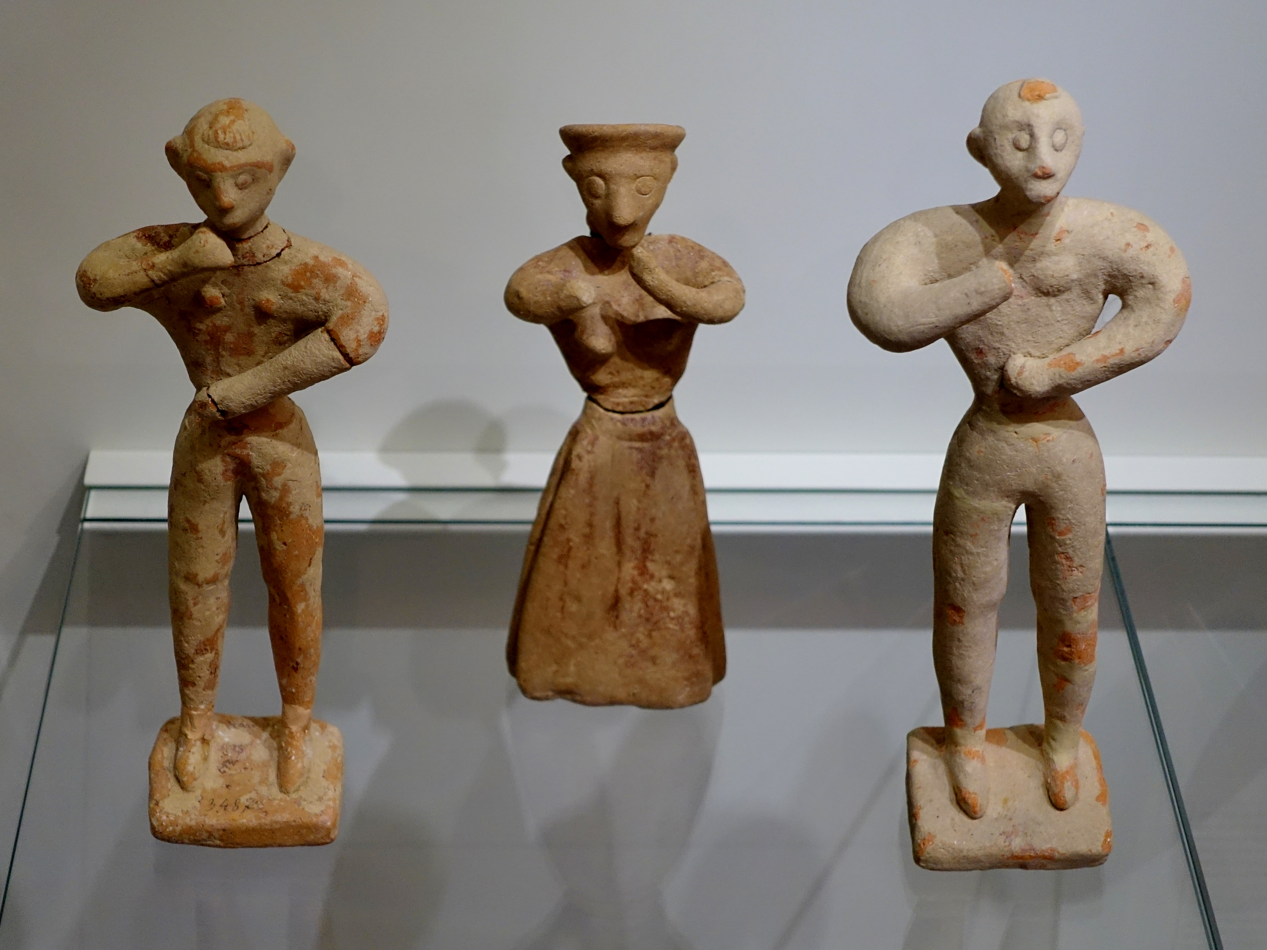 Zwei männliche und eine weibliche Figur (Altpalastzeit, 1900–1700 v. Chr.) aus Raum 2 in Chamaizi (Sitia), ausgestellt im Archäologischen Museum Iraklio, Kreta, Griechenland